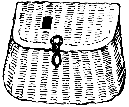 Creel